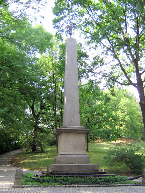 Обелиск «Орёл».